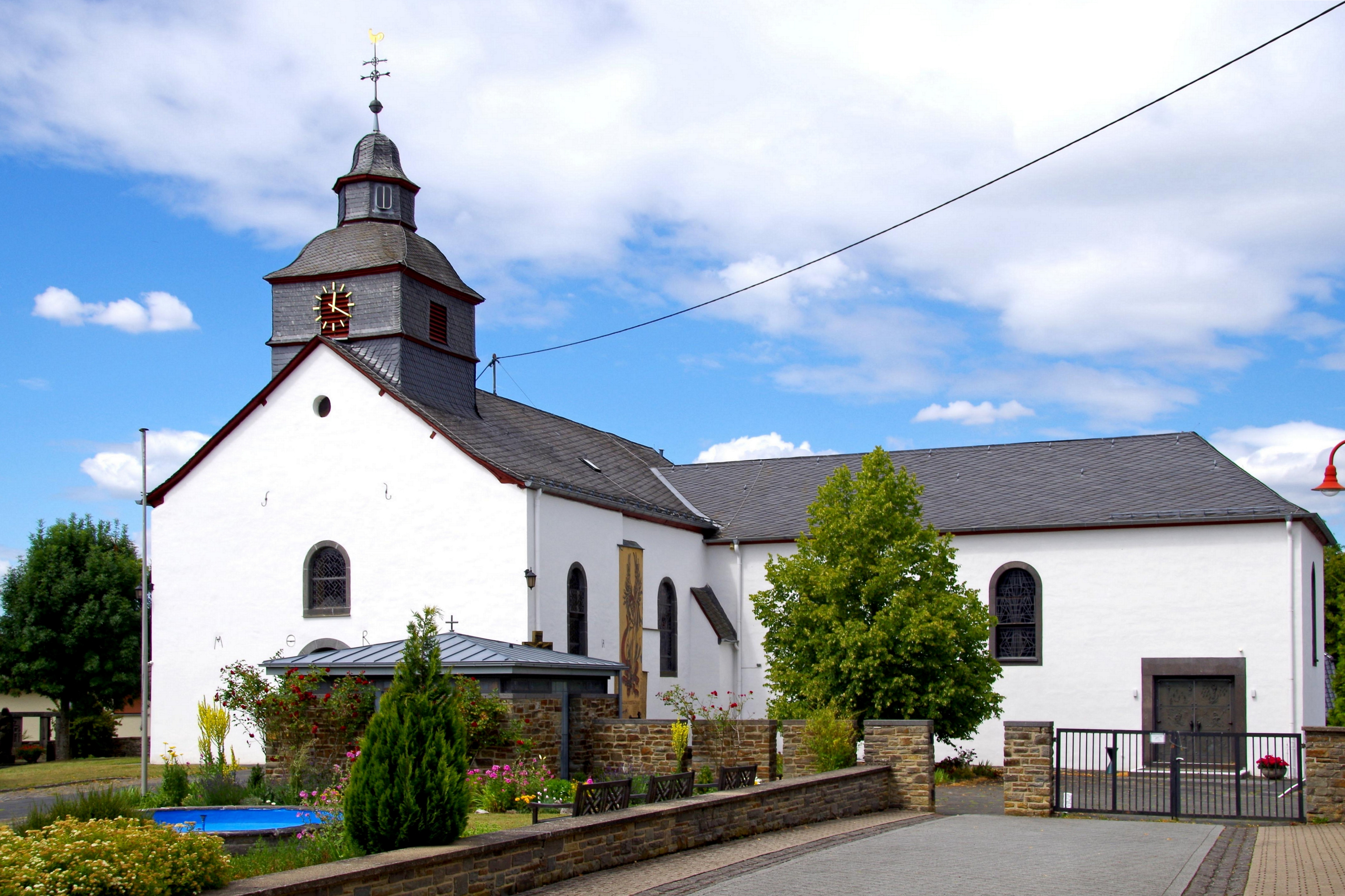 St. Gertrud (Barweiler), Ostseite mit Erweiterungsbau rechts